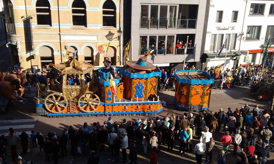 carnavaltemse